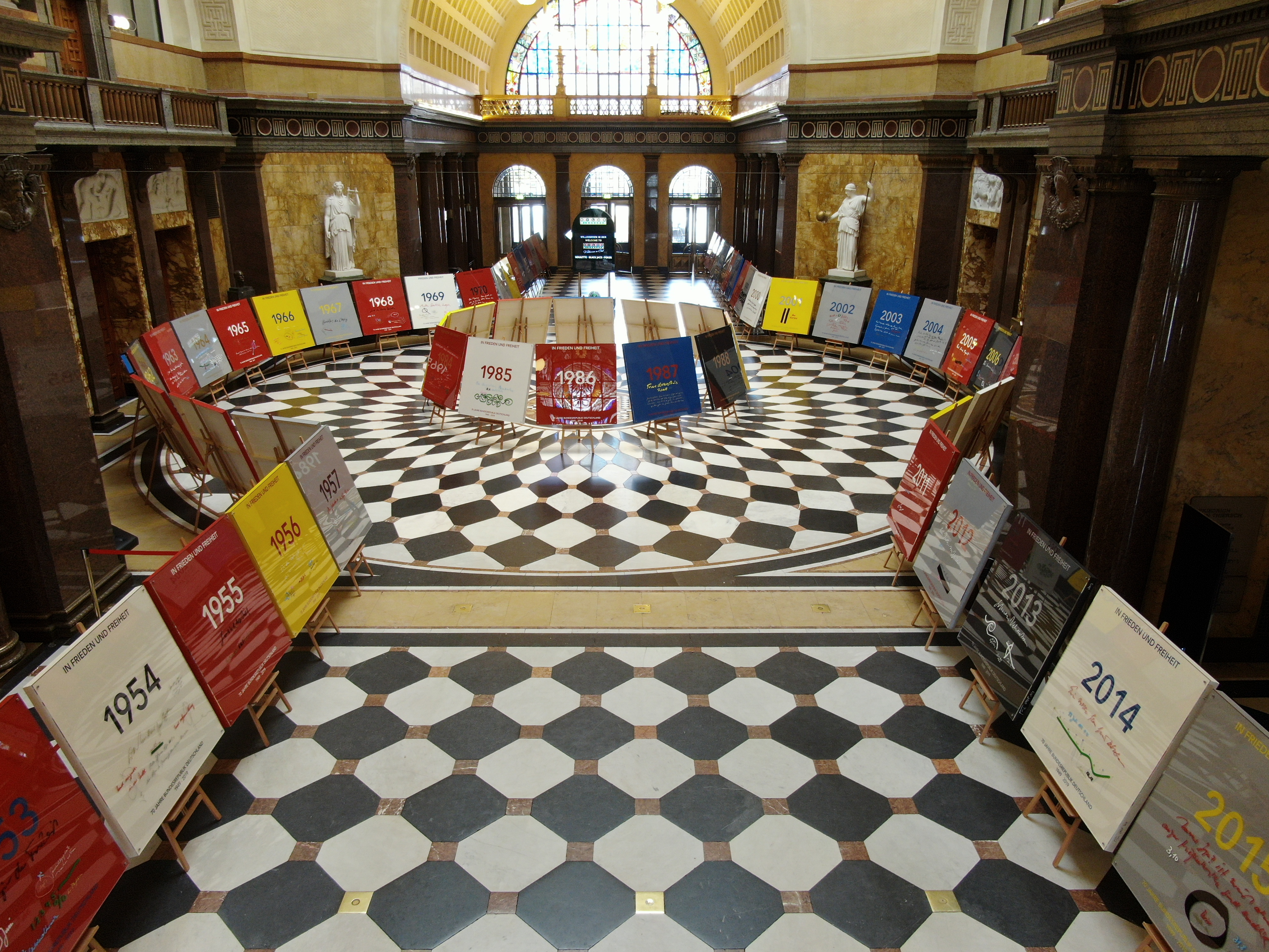 Ein Blick auf die über 110 Meter lange Ausstellung der 74 Exponate im Wiesbadener Kurhaus.